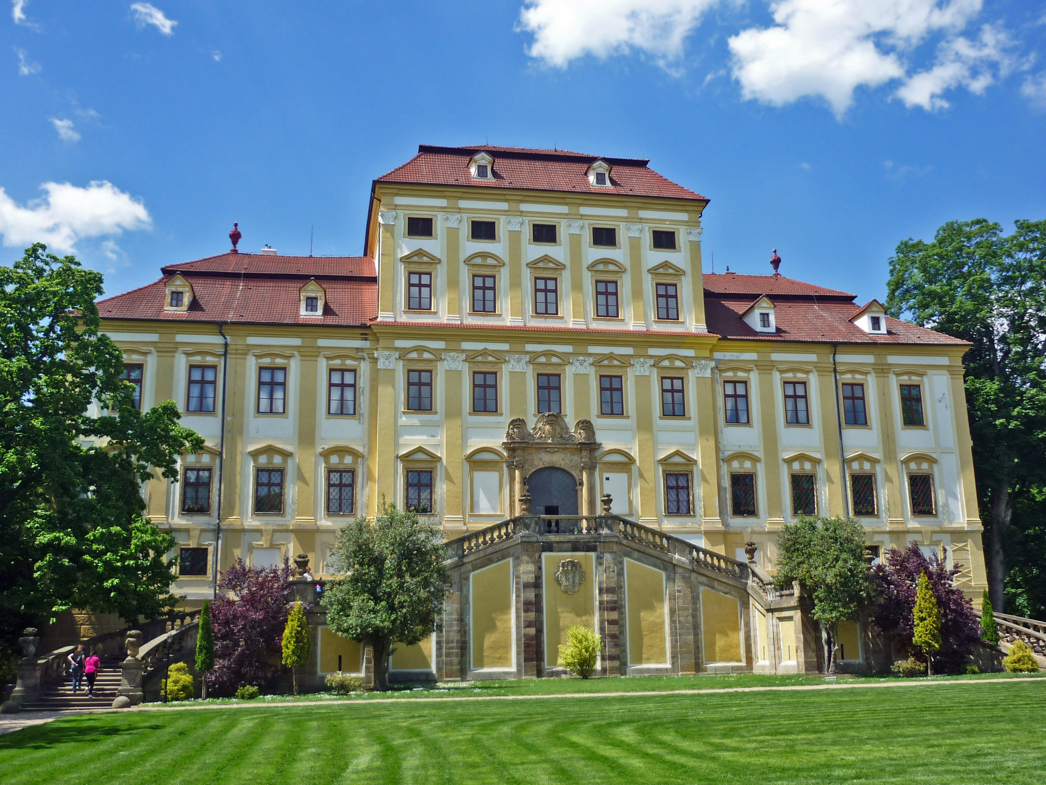 Schloss Rothenhaus bei Görkau in Nordböhmen (Červený Hrádek bei Jirkov)